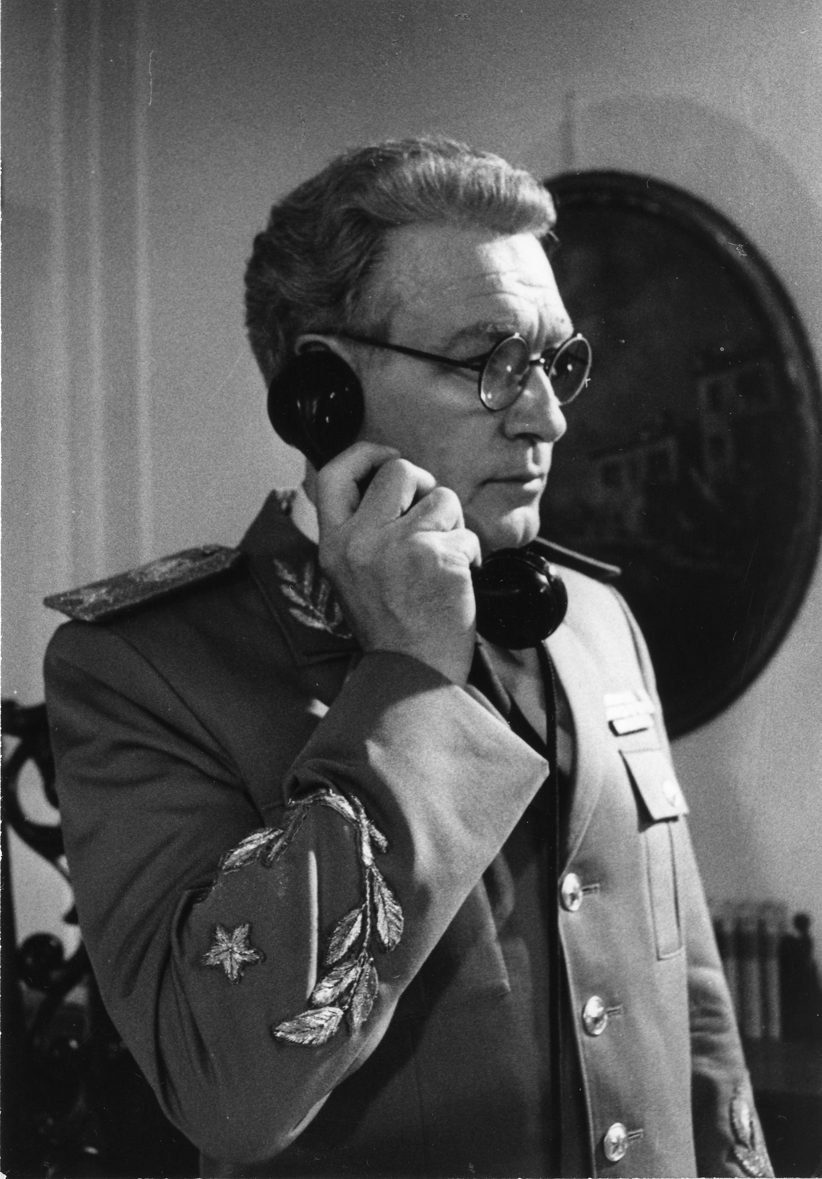 Marko Todorović kao Tito, u Tv seriji Odlazak ratnika, povratak maršala Save Mrmka, 1986. (Po odobrenju kćerke Tanje Kragujević)